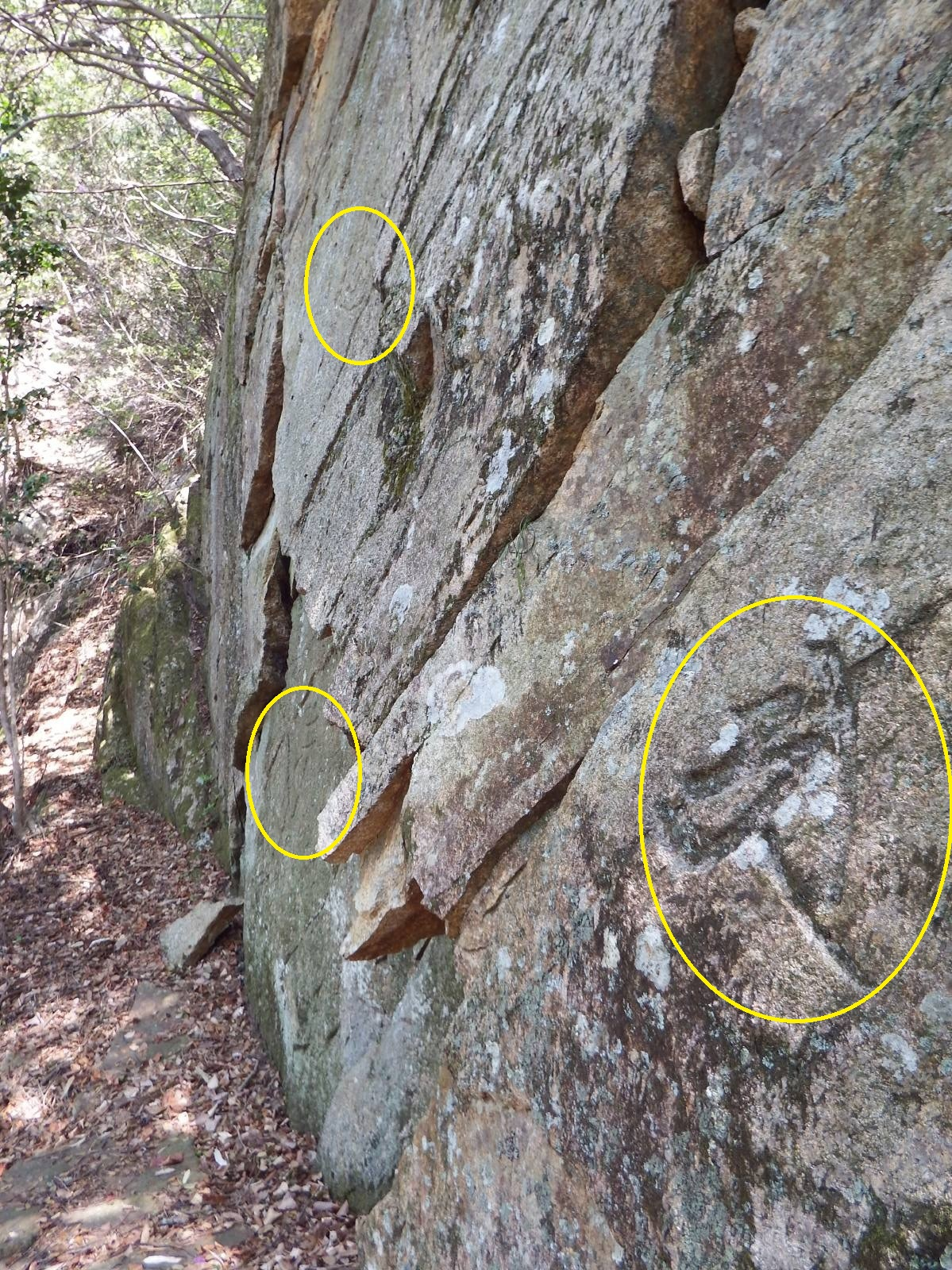 大窪寺の奥之院の岩壁